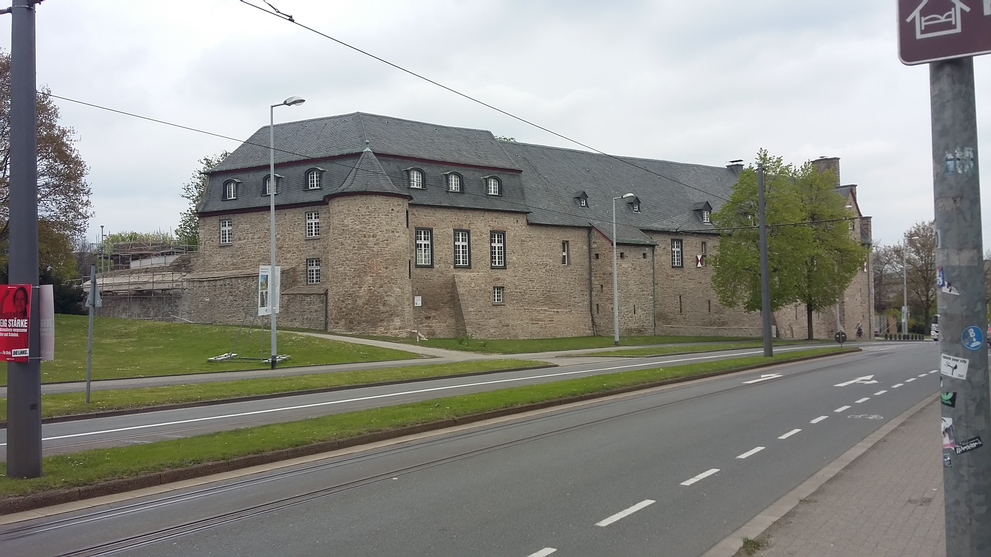 Schloss Broich